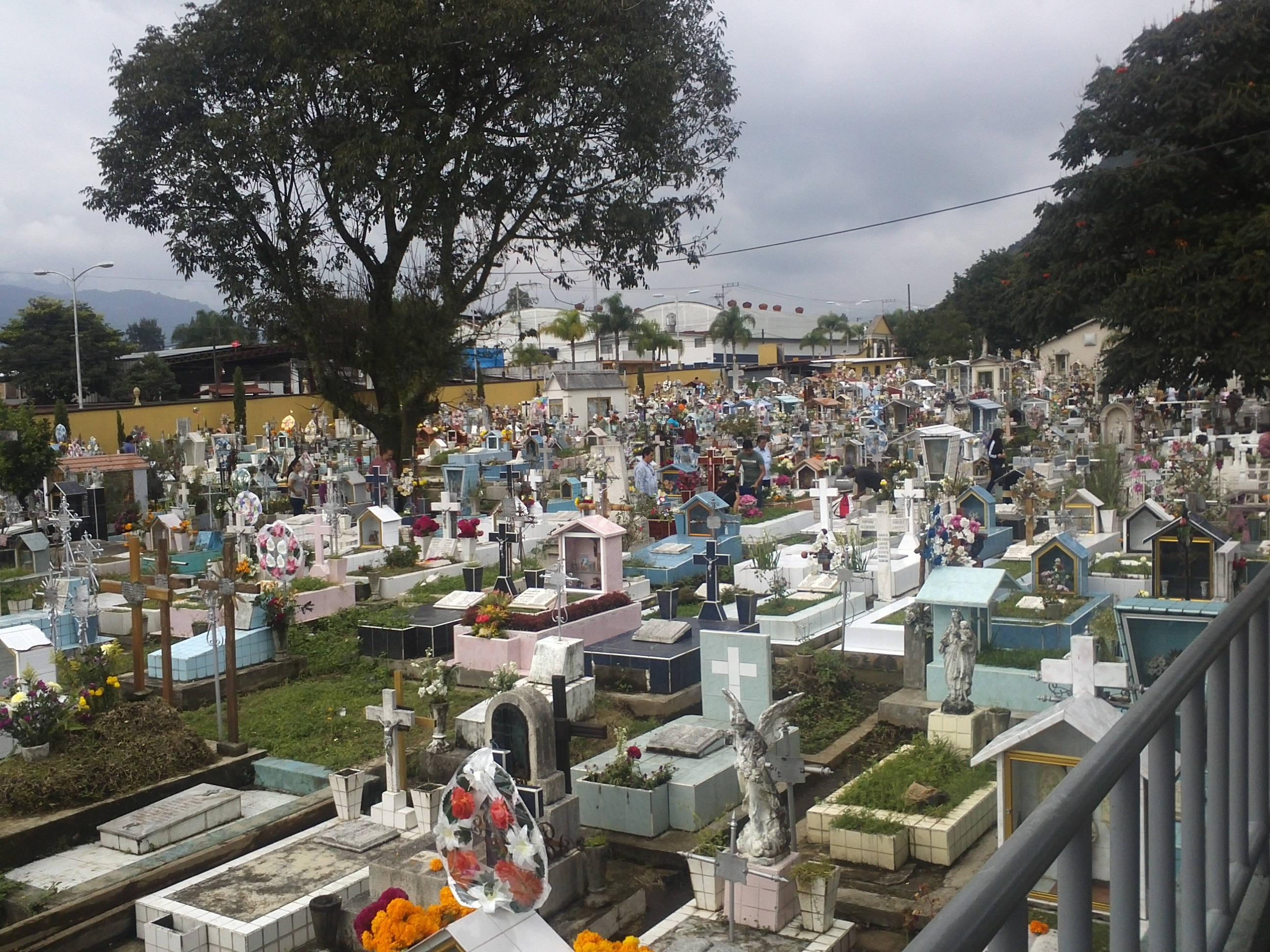 Tumbas en el panteón de Orizaba